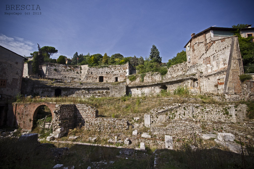 Il Teatro Romano che affianca il Tempio Capitolino e il Foro